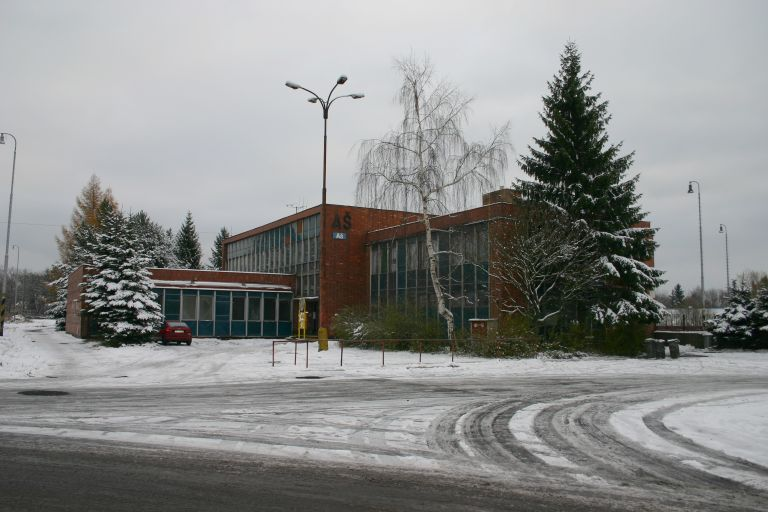 Železniční stanice Aš